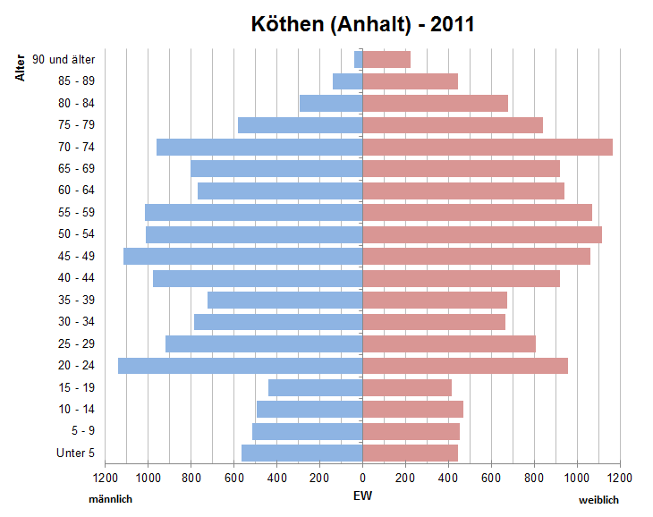 Bevölkerungspyramide der Stadt Köthen (Anhalt) nach Zensus 2011.